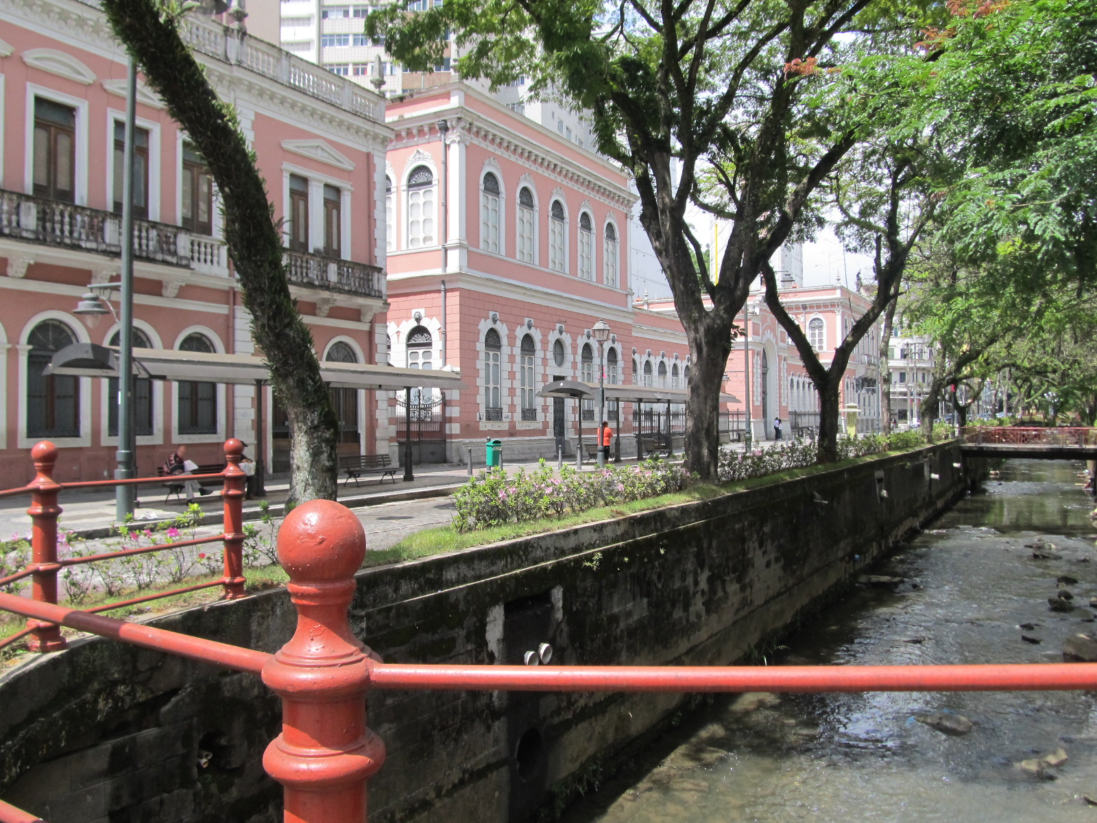 "Cidade Imperial": Petrópolis, RJ, Brasil.